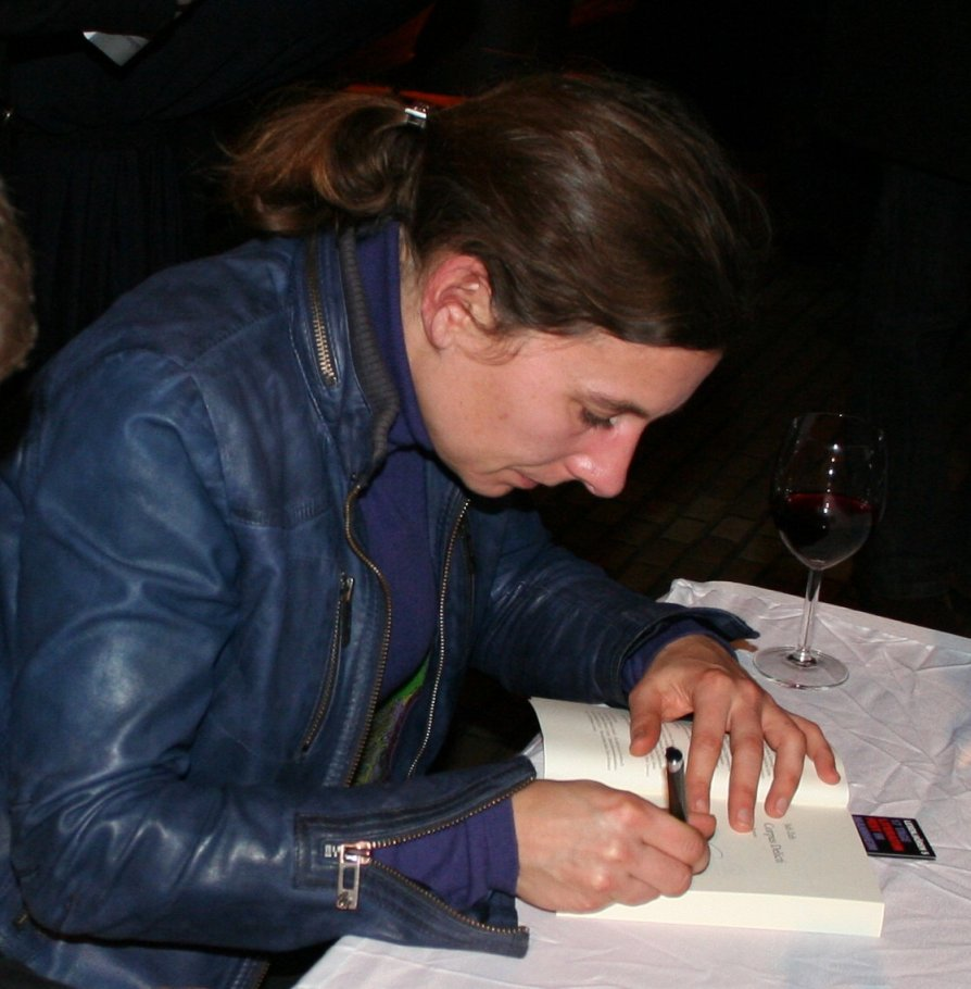 Schriftstellerin Juli Zeh beim Mannheimer Literaturfest "lesen.hören"